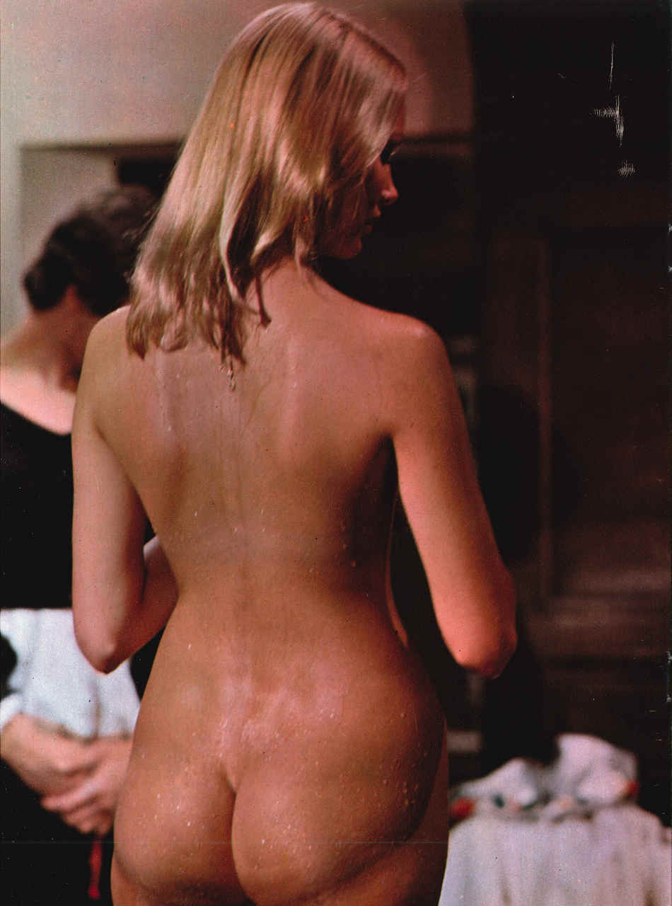 L'attrice svedese Janet Agren in uno scatto di scena sul set del film Racconti proibiti... di niente vestiti (1972) di Brunello Rondi.